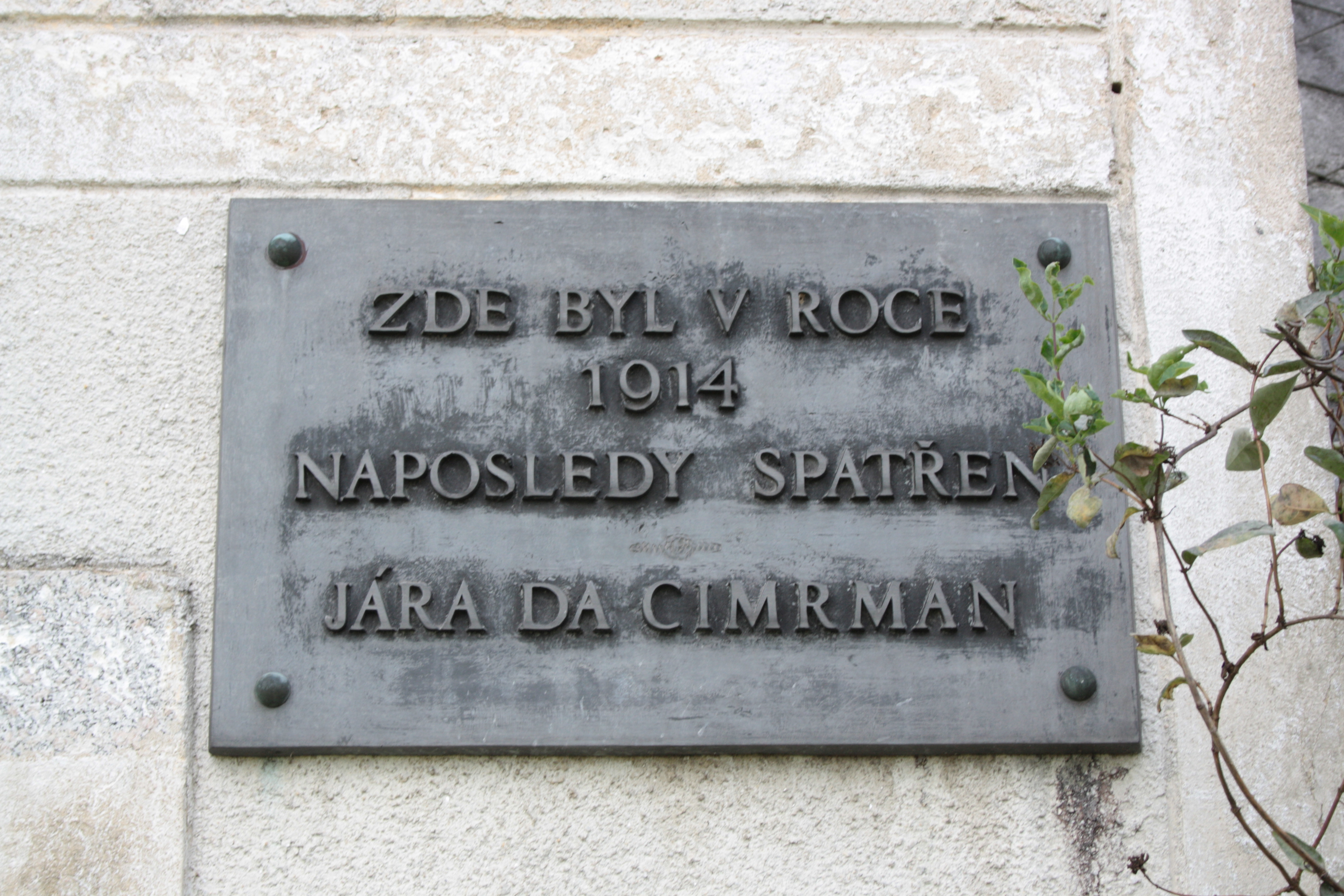 This photograph was taken with a DSLR from WMCZ's Camera grant. Pamětní deska na domě číslo popisné 21 ve Ferdinandově upomínající na poslední zdejší spatření Járy da Cimrmana v roce 1914.